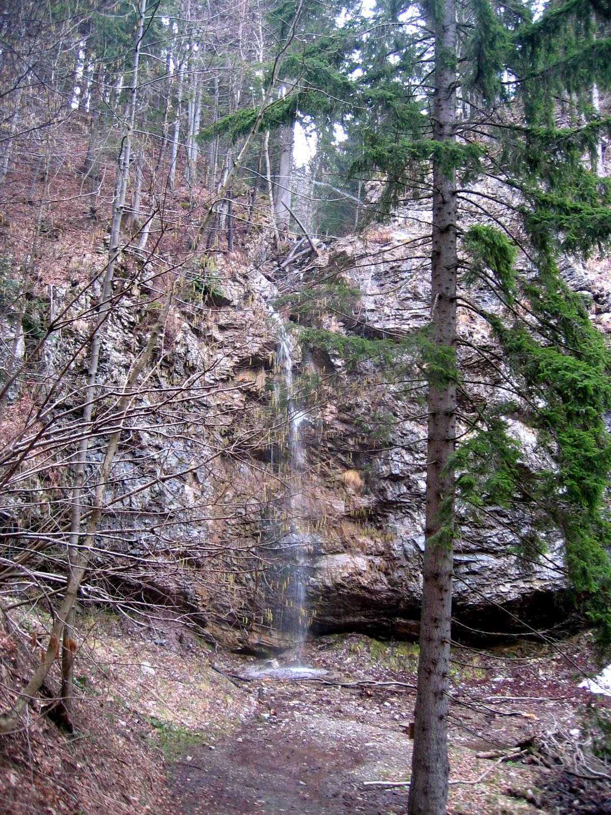 Rancka waterfall, ice climbing spot in Gorenja Žetina, Slovenia photo:Ziga 09:09, 25 February 2007 (UTC)